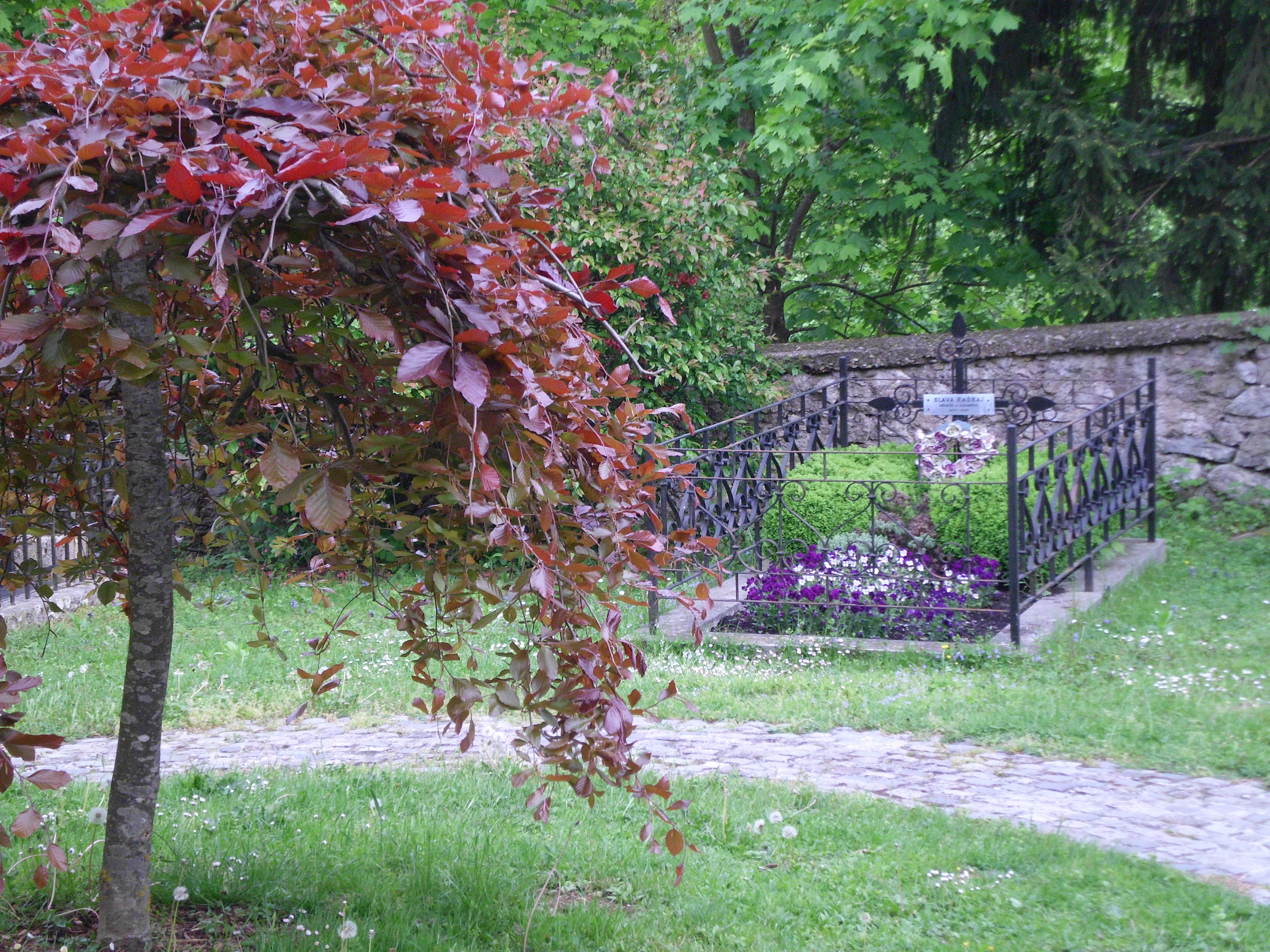 Grabstelle in Ozalj